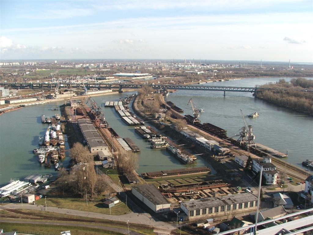 Zimný prístav a Prístavný most (9.2.2007)